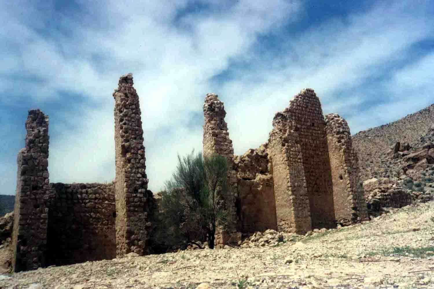 کاخ کيقباد رحمت آباد جویم